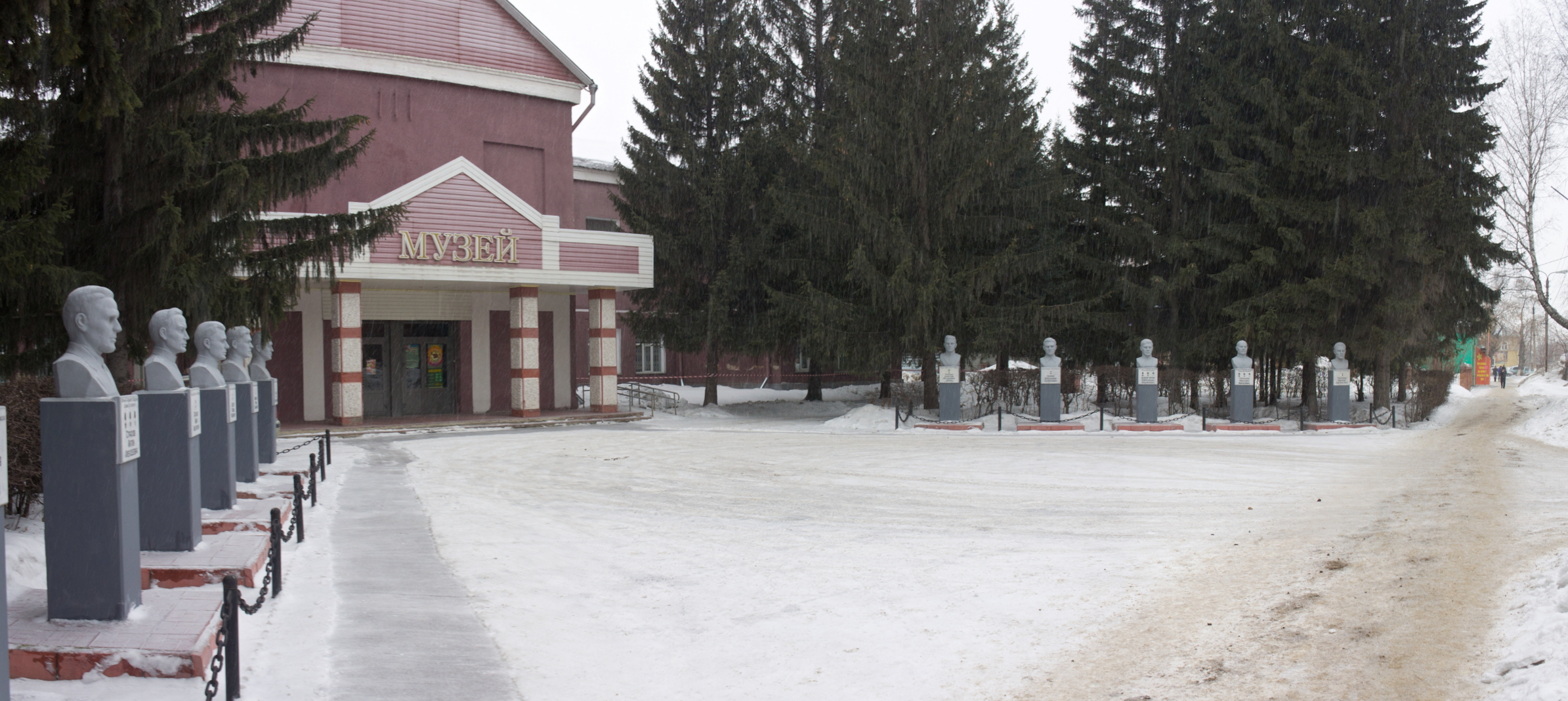 ул. Коротеева